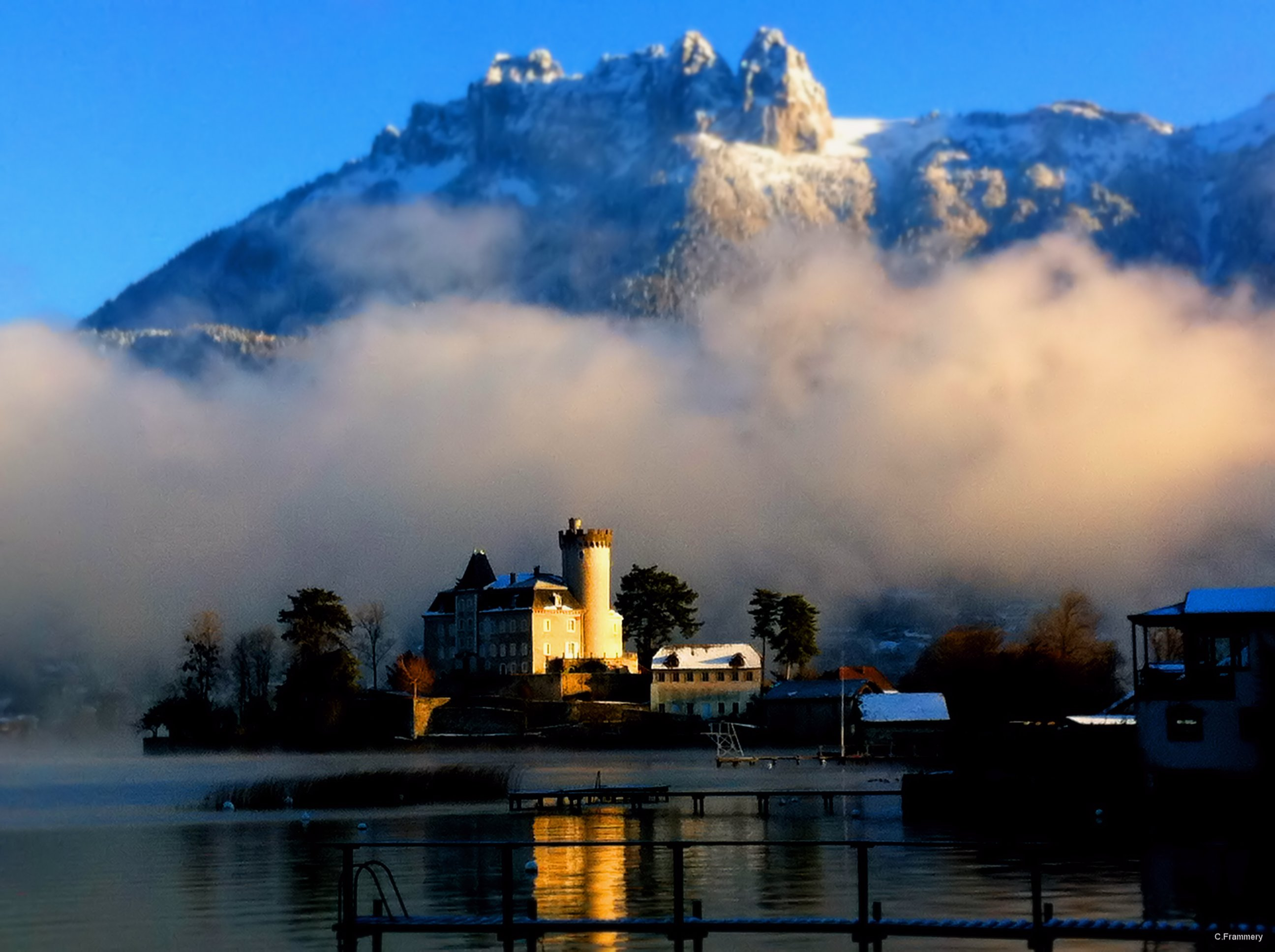 La presque-île de Duingt et son château en hiver.